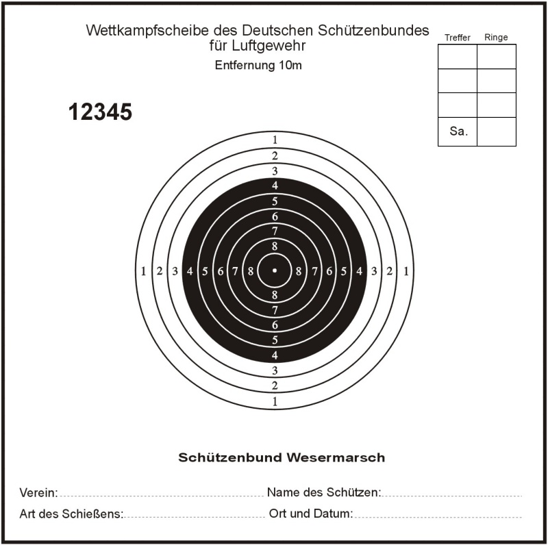 Luftgewehrscheibe 10m